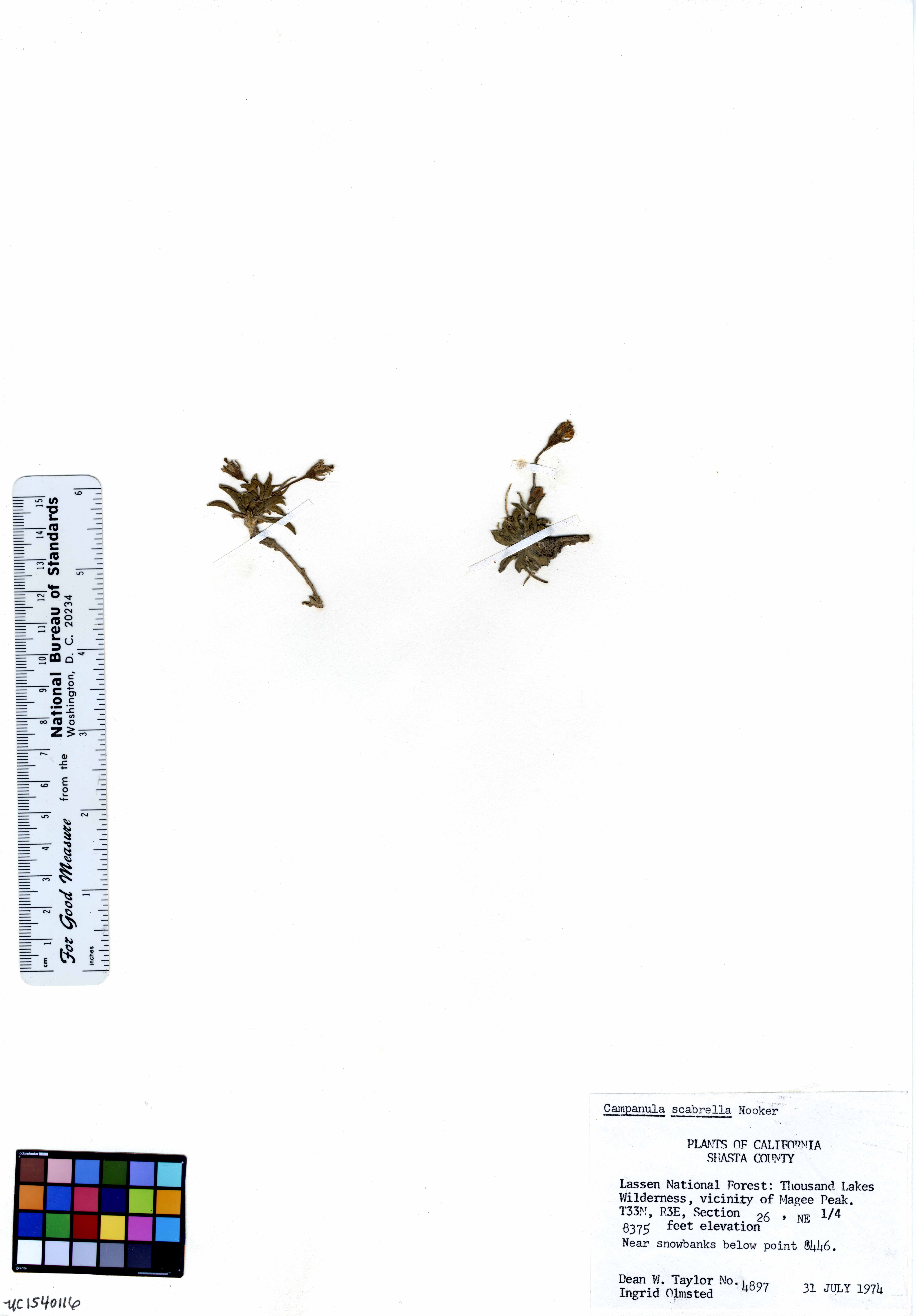 Uc1540116 rsa407606